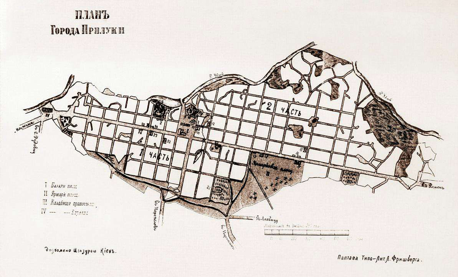 План Прилук, підготовлений губернською креслярнею під керівництвом арх. Плотнікова після 1802 р.